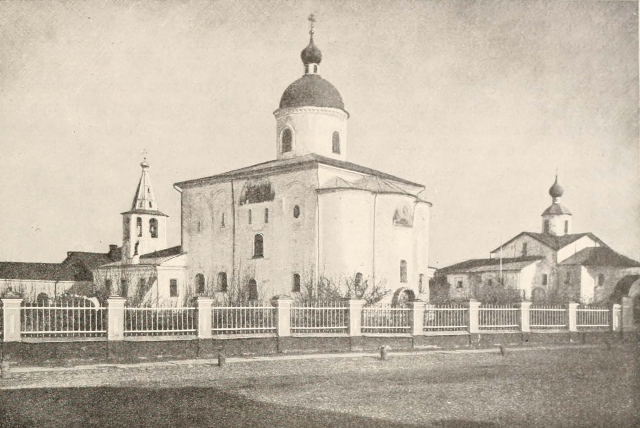 Место бывшего Ярославова дворища в Новгороде. Конец XIX века